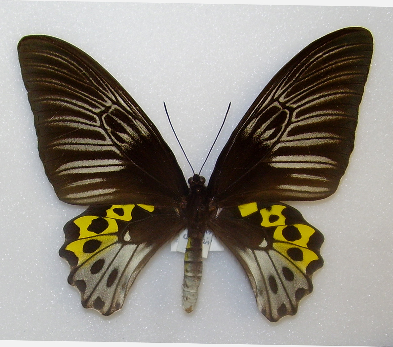 Troides hypolitus cellularis Female, upperside Celebes September 30 1974